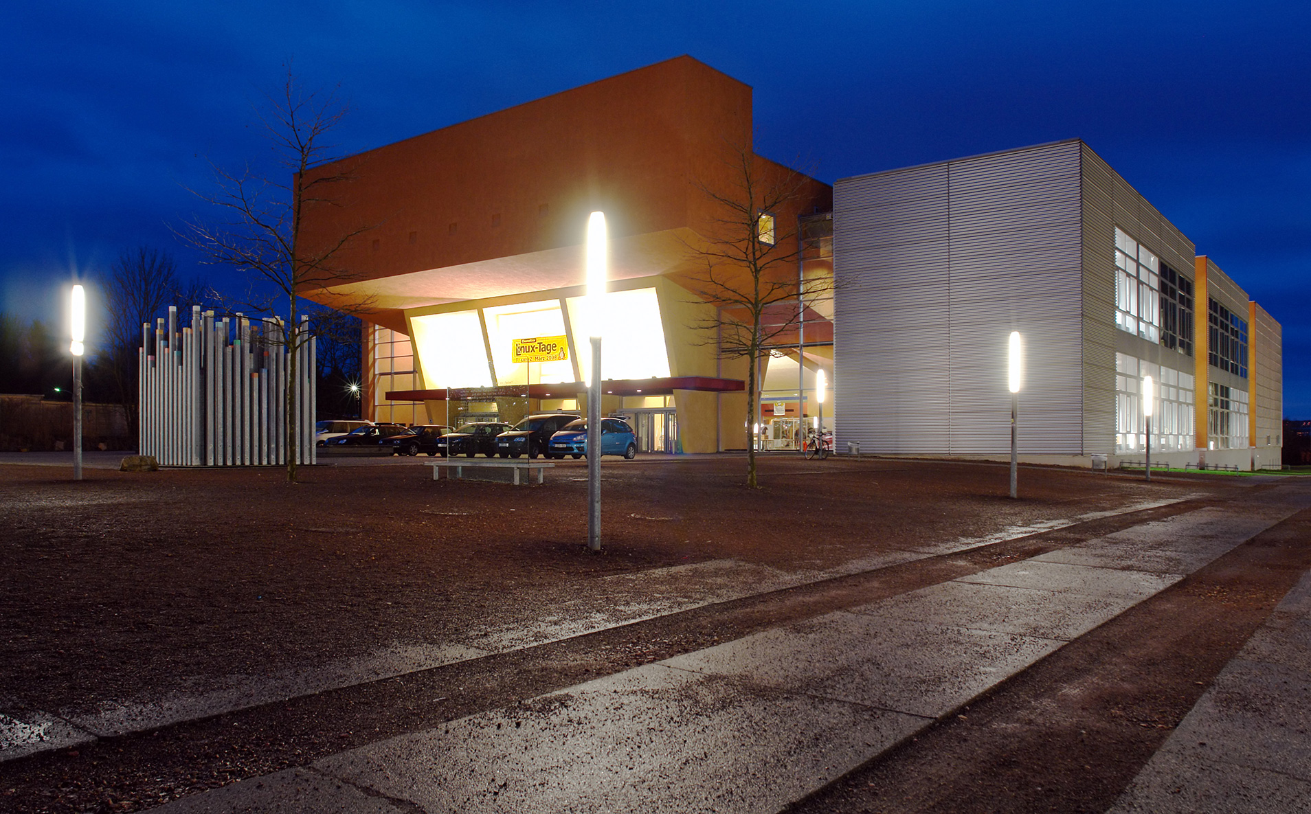 TU Chemnitz Neues Hörsaalgebäude